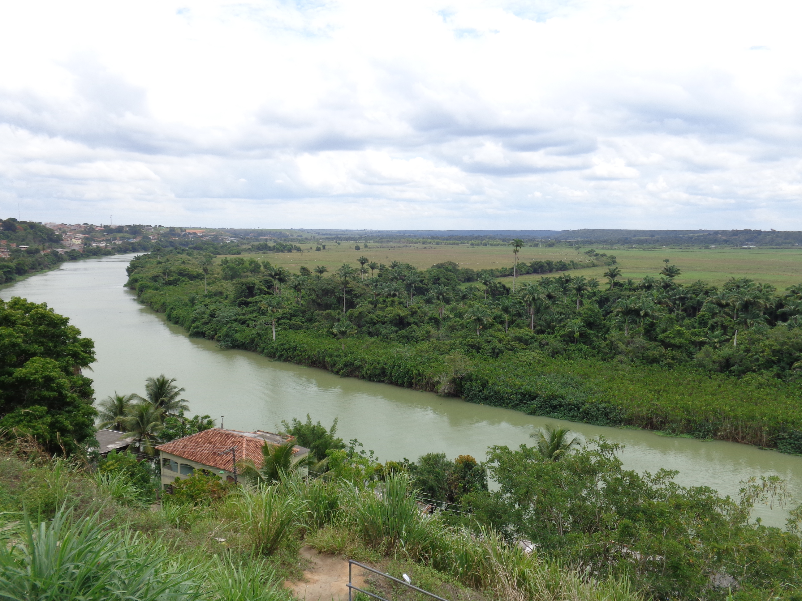 Vista do Rio São Mateus a partir da Praça do Mirante em São Mateus-ES